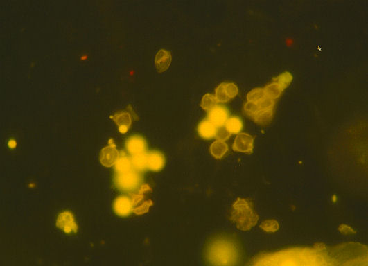 Erythrozyten im Urin. Schatten Erythrozyten.Erythrophagozytos. Fluoreszenzmikroskopie,Acridinorange-Färbung